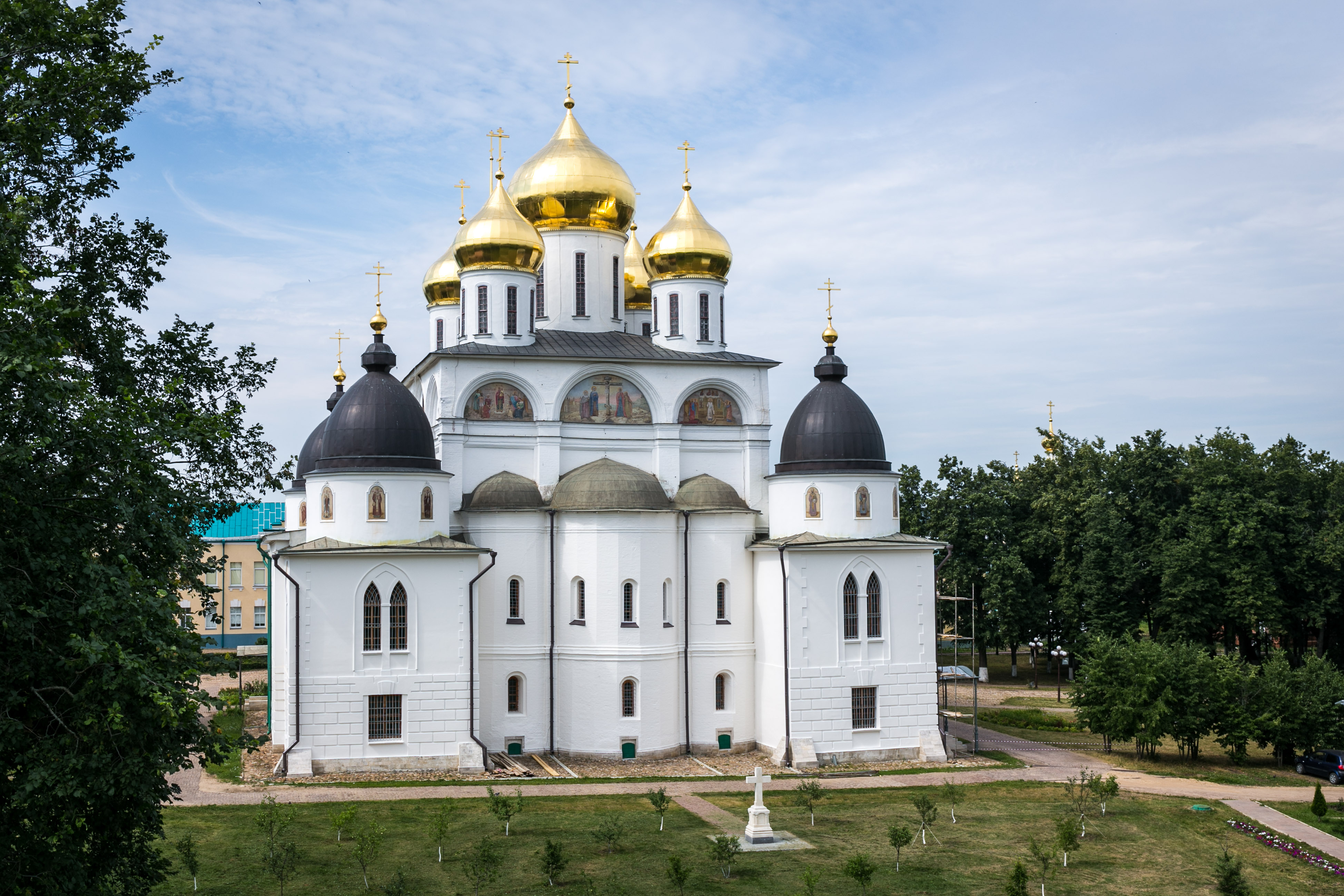 Собор Успения Пресвятой Богородицы: площадь Историческая, 11, Дмитров, Дмитровский район, Московская область